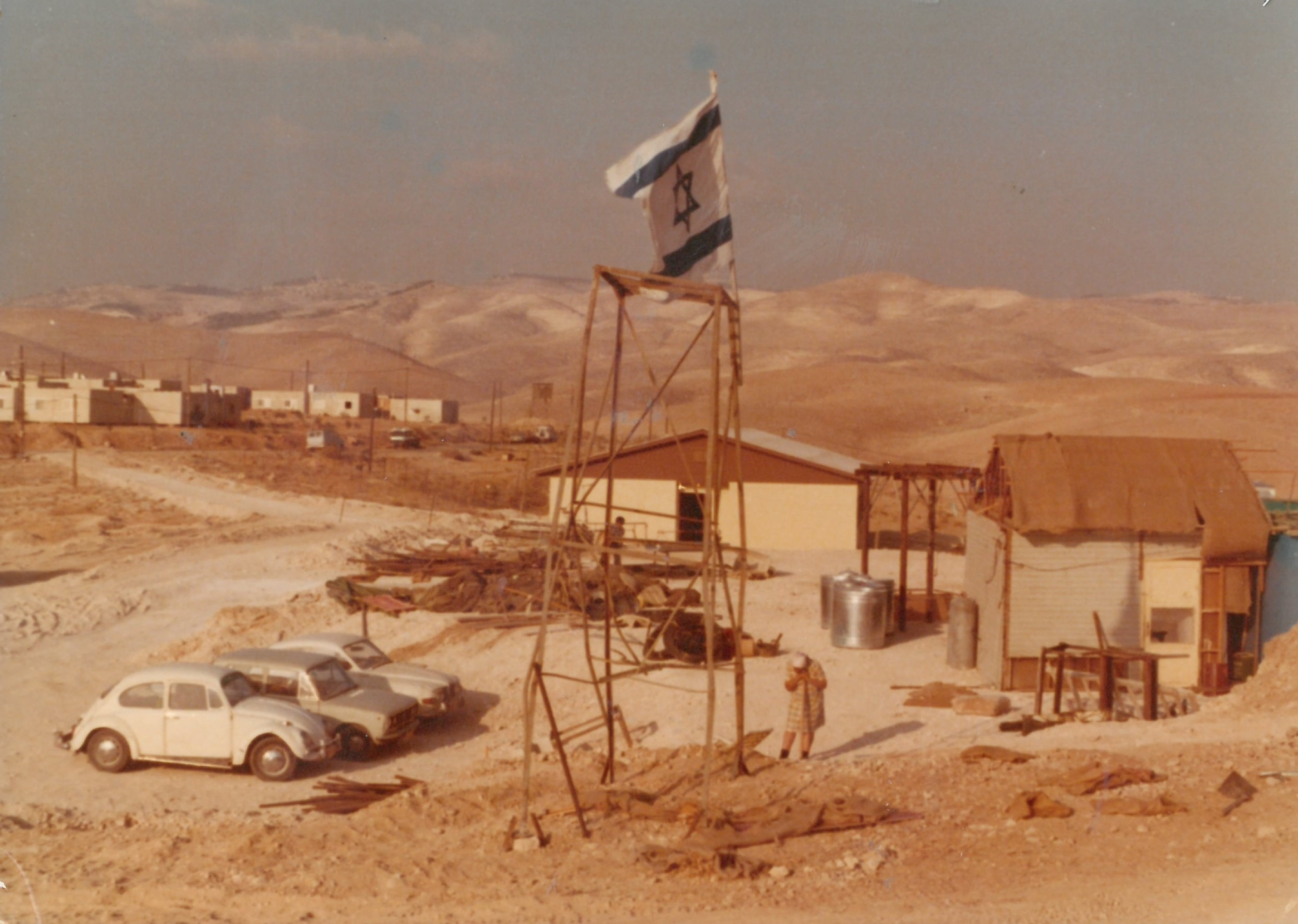 גרעין יריחו במישור אדומים. סוכות תשל"ח. המבנה במרכז התמונה הוא ישיבת ההסדר מעלה אדומים. המבנה מימין הוא חלק מהצריף של גרעין יריחו, שהיה אמור להיות מוקם ביריחו, והוקם לבסוף במצפה יריחו.